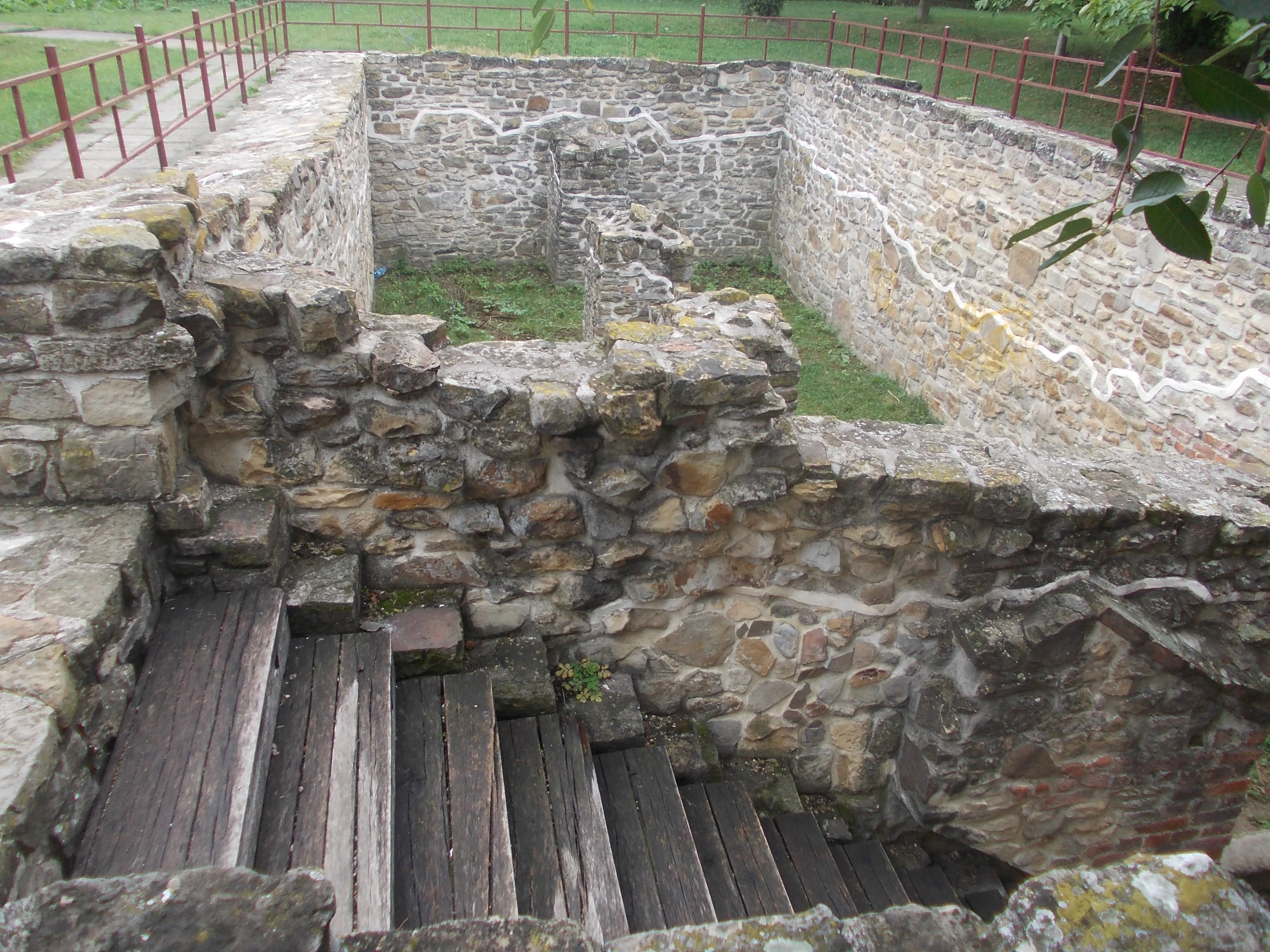 Ruine casă domnească 02